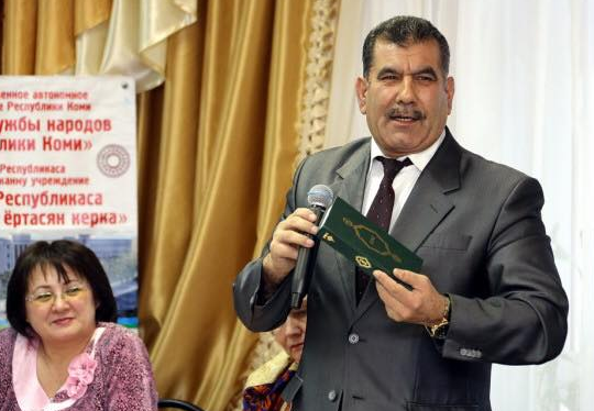 Həsən Qasımov